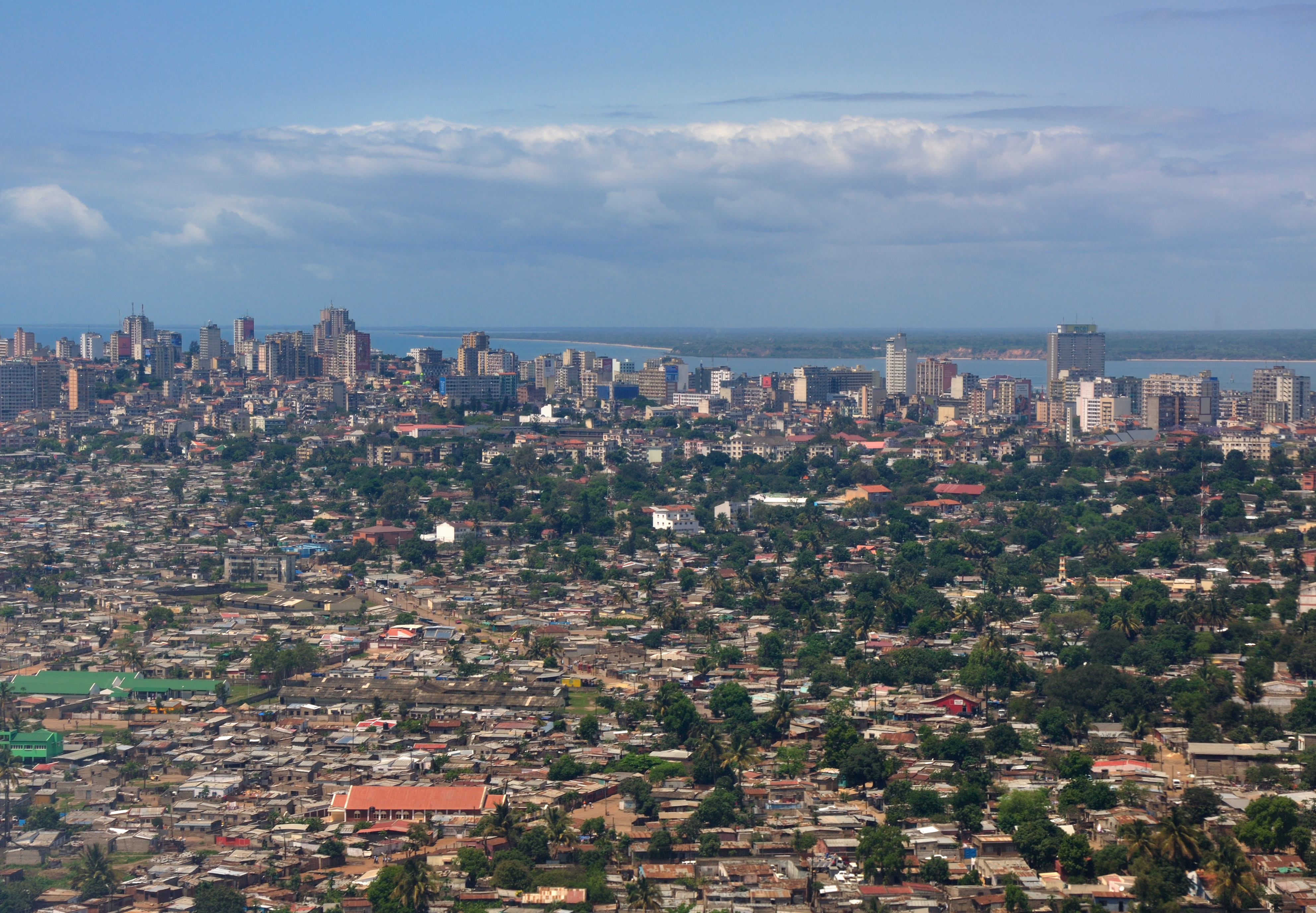 Mozambique, approach into Maputo